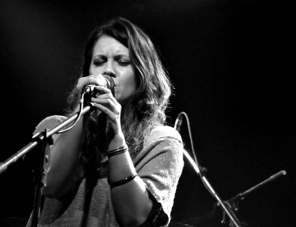 דיאנה גולבי - זמרת